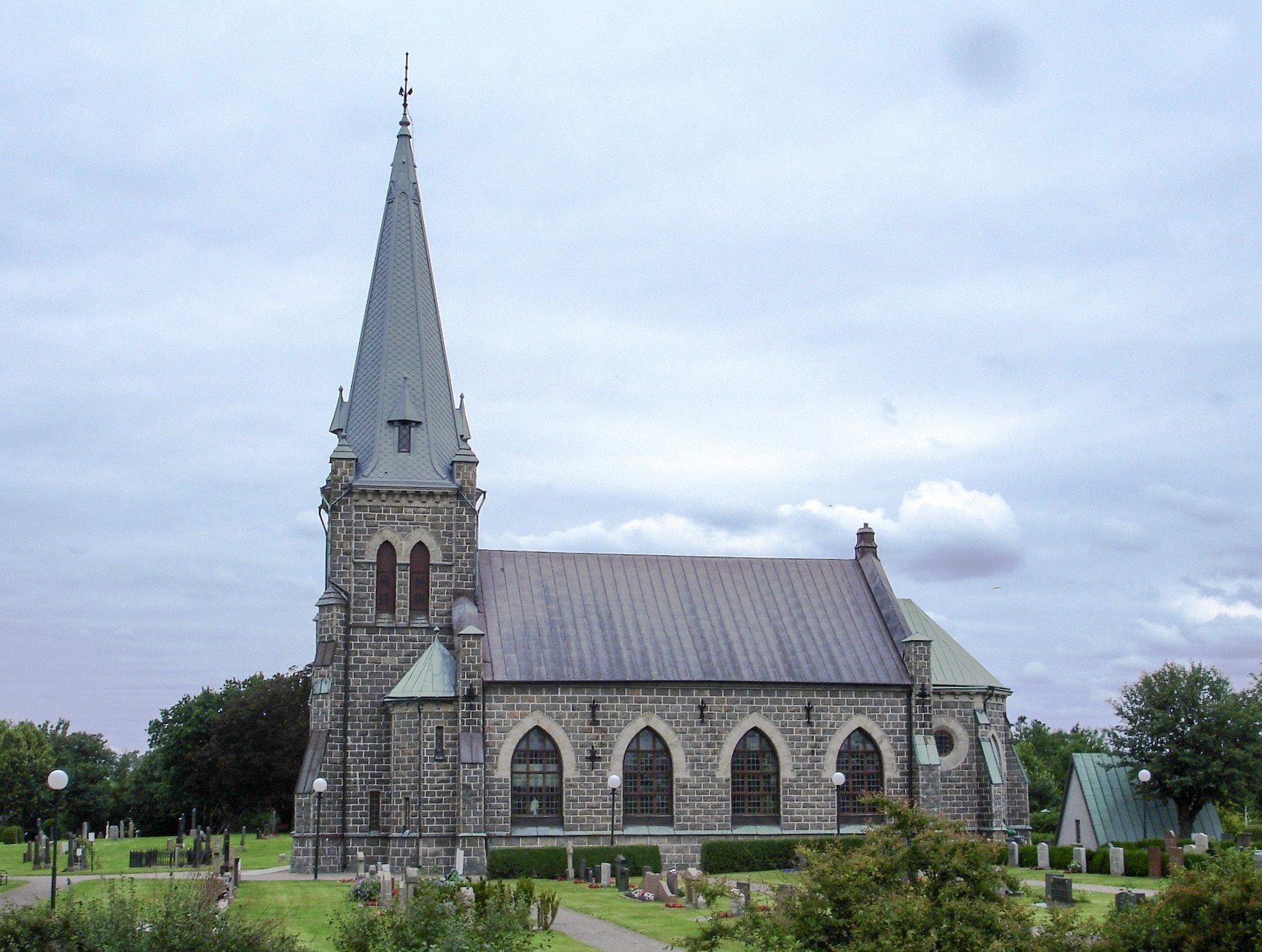 Trönninge kyrka söder om Halmstad i halland